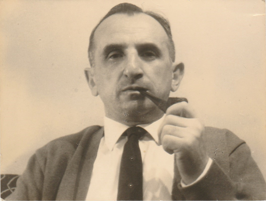 אליהו גלעזר בבגרותו